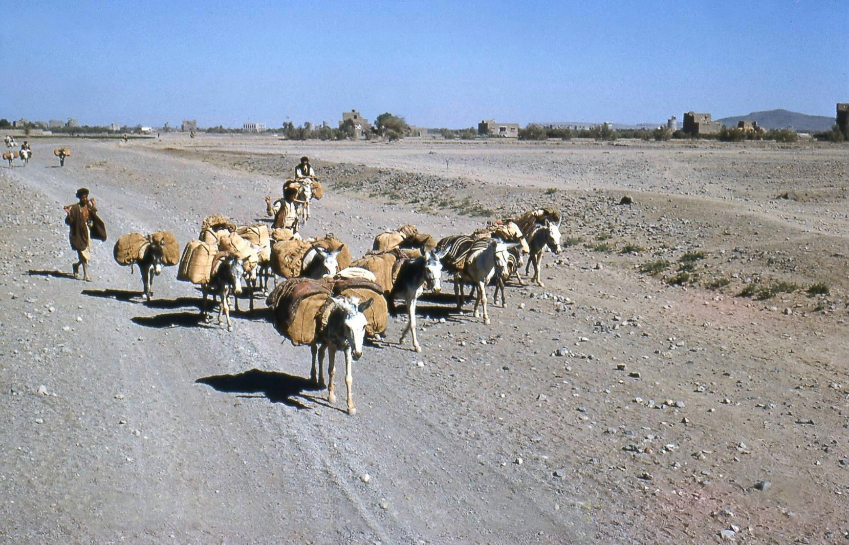 Qat-Transport nach Sanaà, 1958